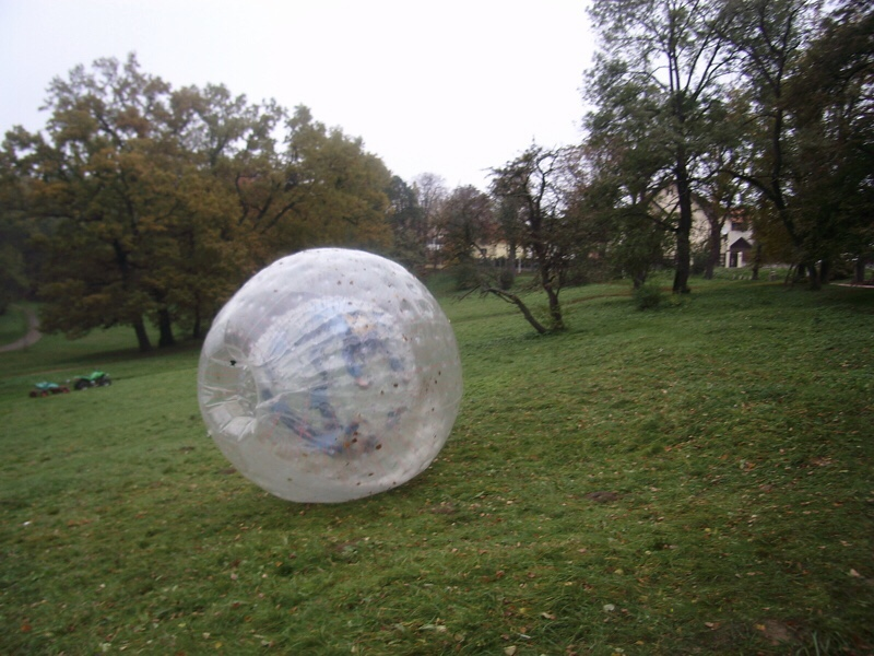 Minge de zorbing în parcul Sub Arini, Sibiu.